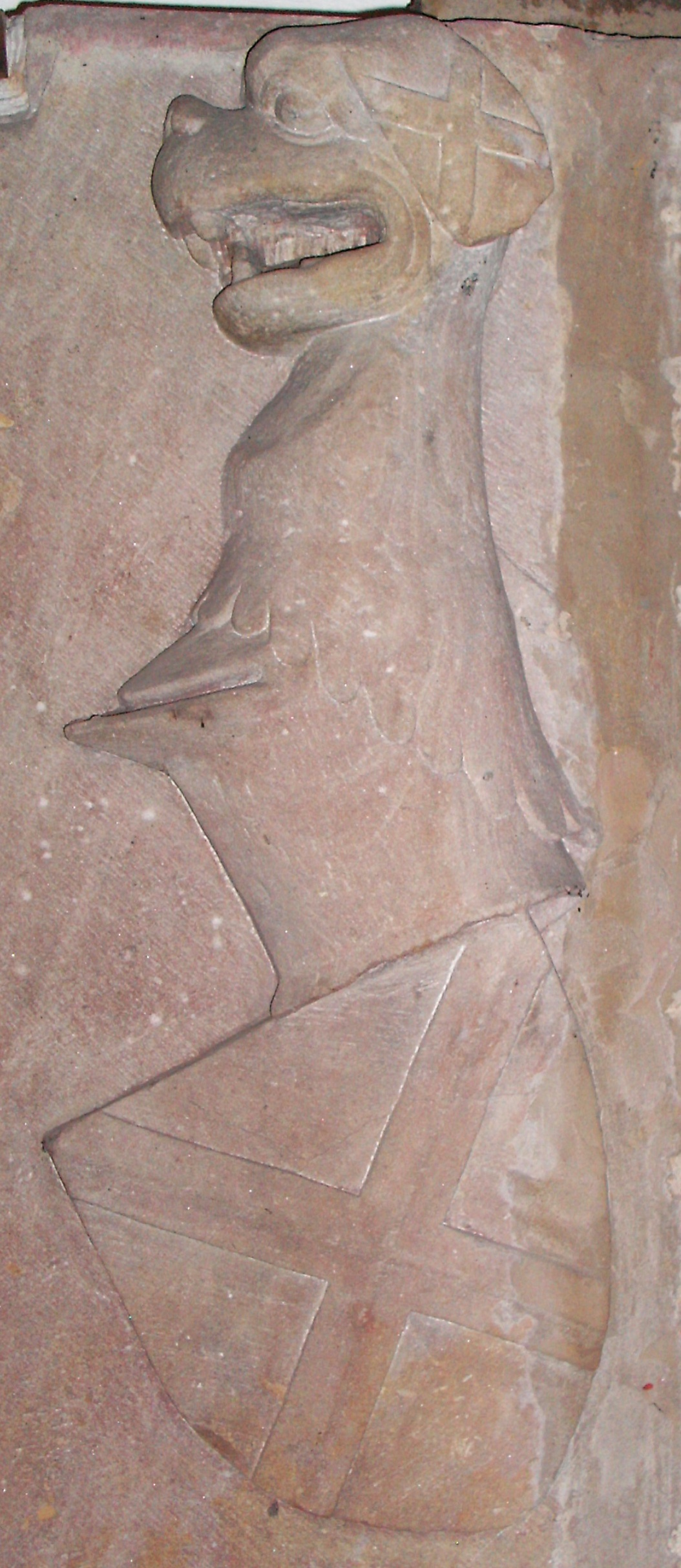 Wappen "von Öttingen", Epitaph Stiftskirche Neustadt an der Weinstraße, 1406